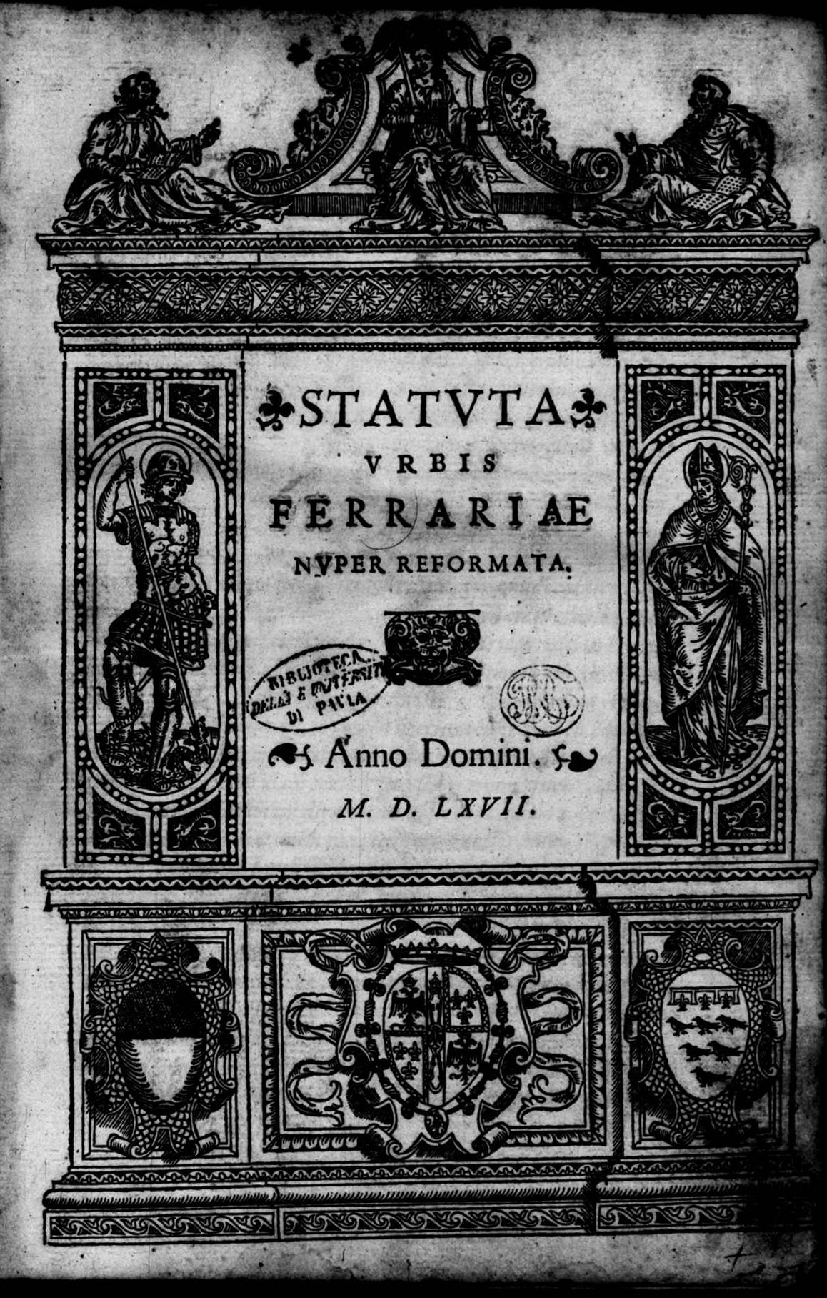 Frontespizio